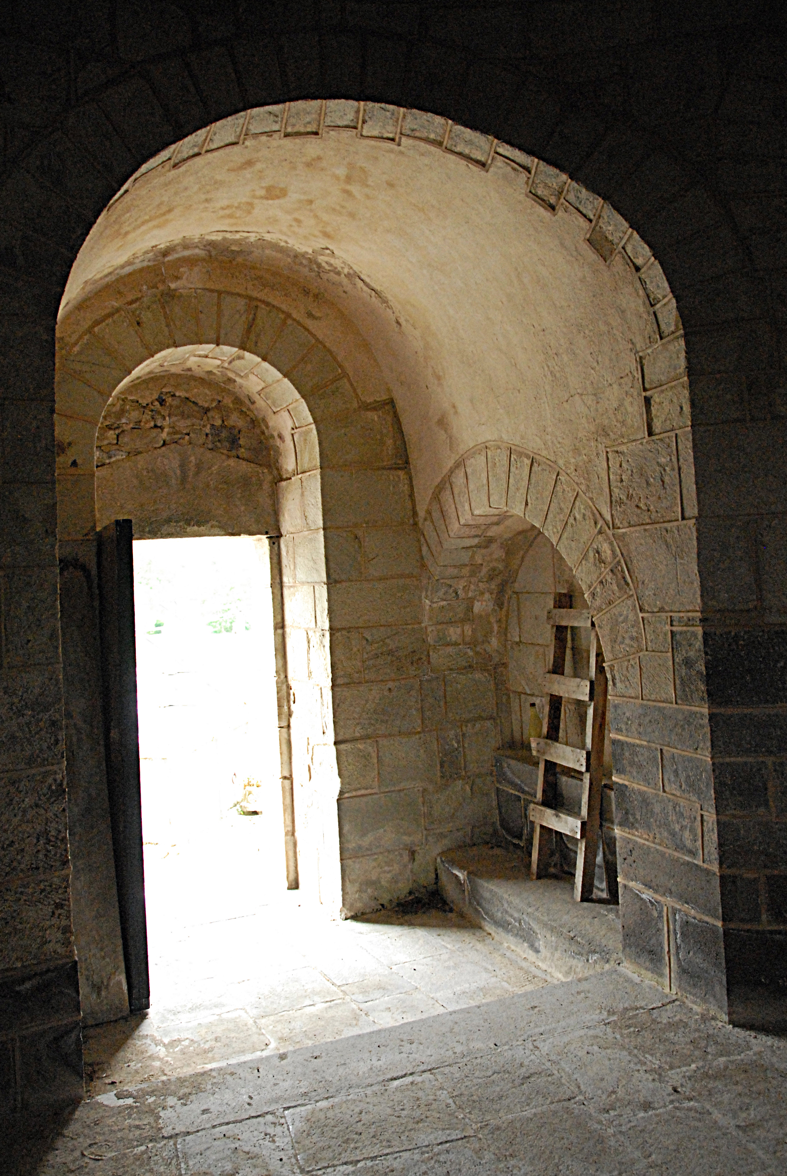 Chambon-sur-Lac, Friedhofskapelle, Narthex